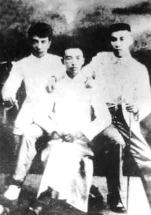 “五四”运动中韩麟符(右)和天津进步学生领袖在一起